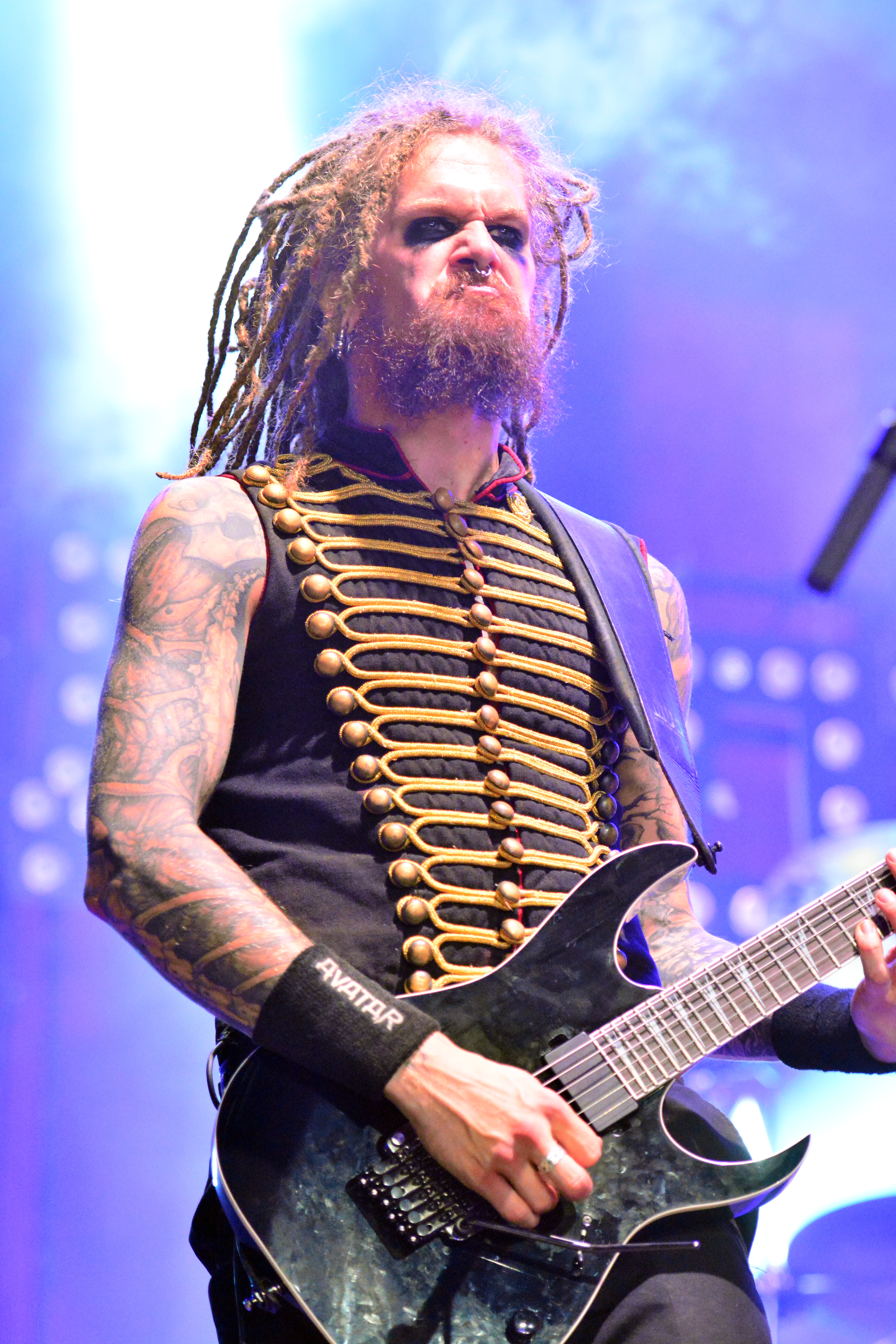 Avatar beim Wacken Open Air 2015